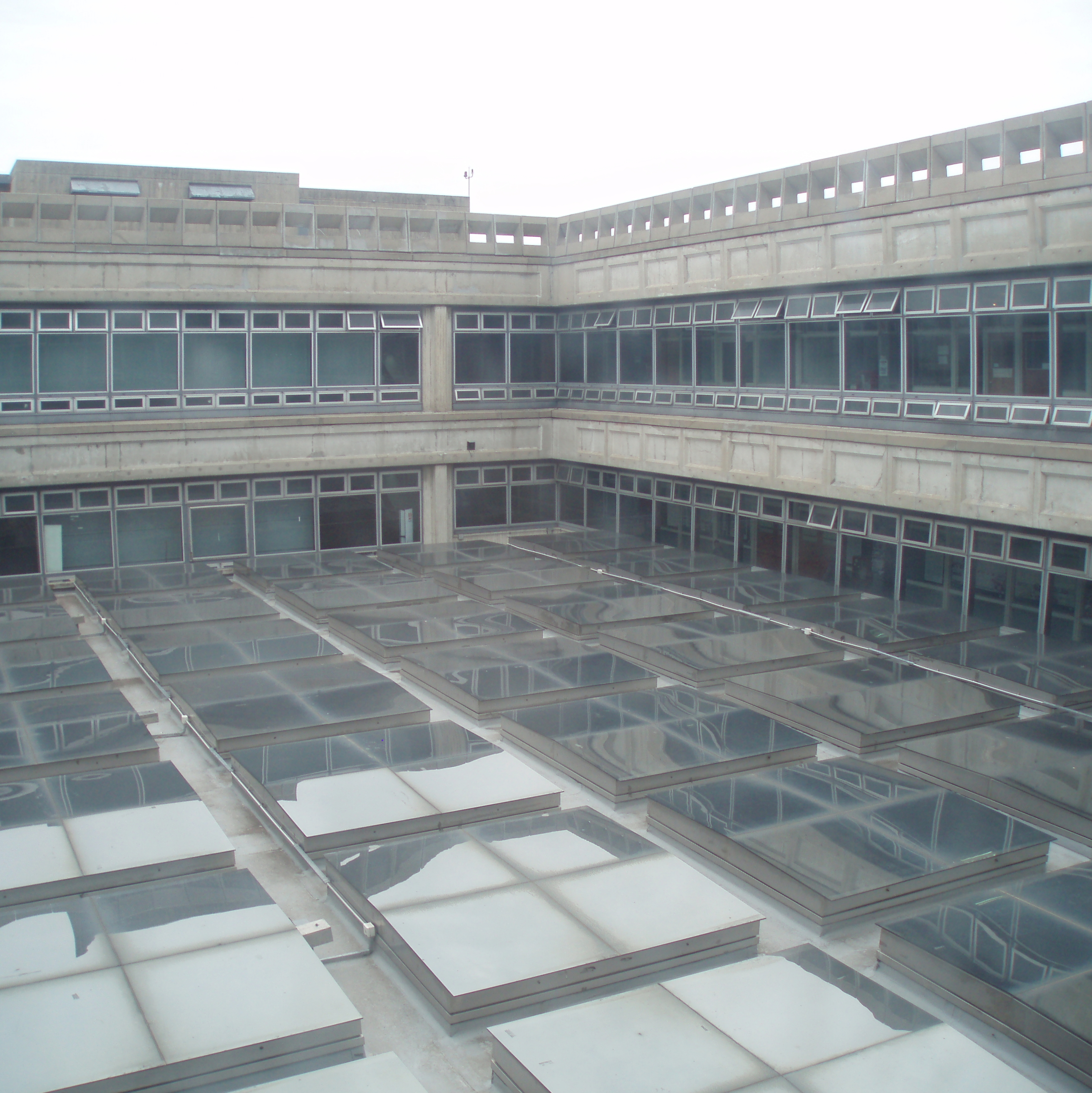 Casetonado del patio central del Pabellón 3 de la Facultad de Arquitectura, Diseño y Urbanismo de la Universidad de Buenos Aires.